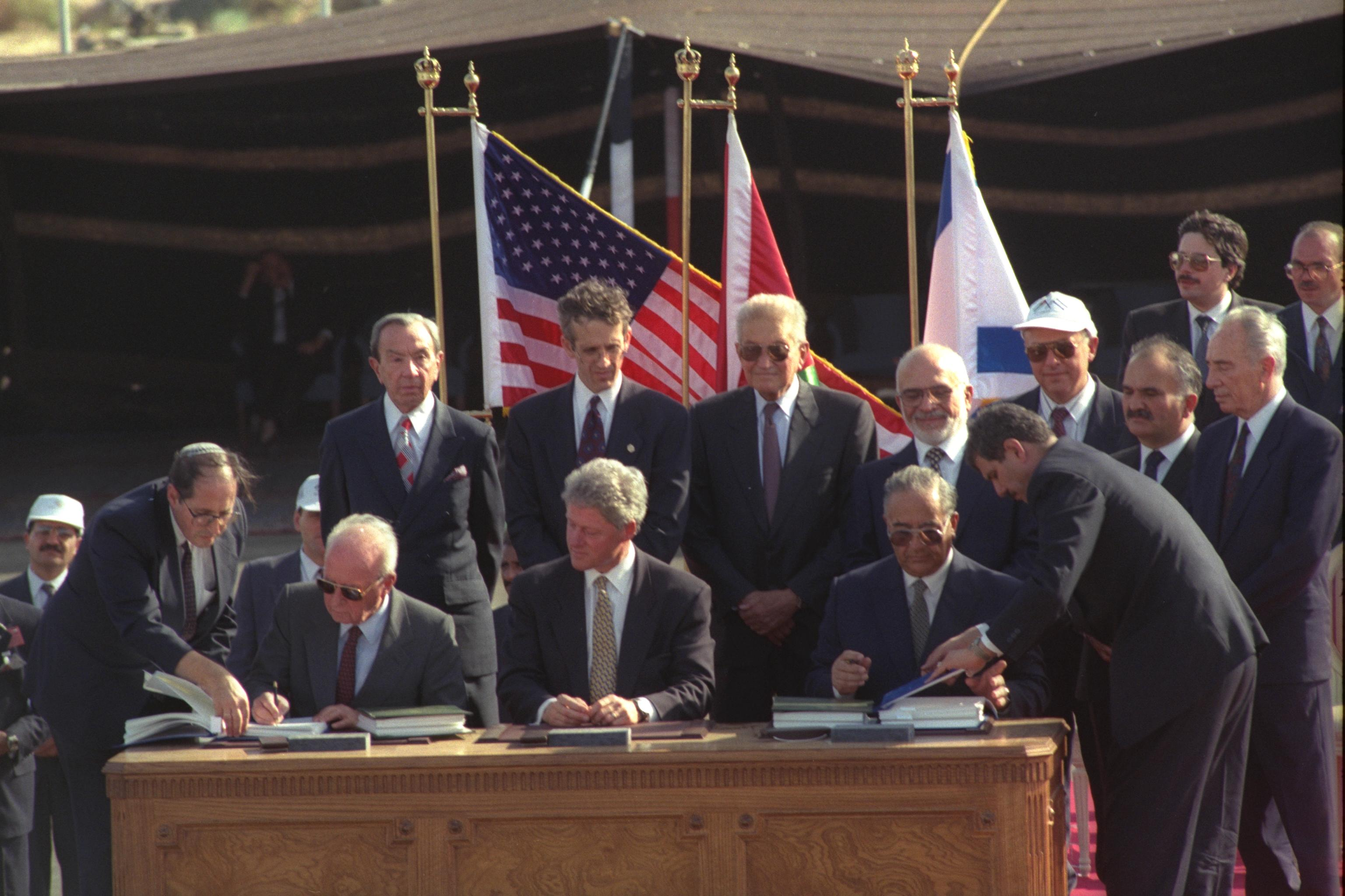 Signing the Israel-Jordan Peace Treaty at the Arava border terminal. Seated (L-R) Prime Minister Yitzhak Rabin, U.S. President Bill Clinton and Jordanian Prime Minister al-Majali. טקס חתימת חוזה השלום בין ישראל לירדן, שהתקיים במסוף הערבה בגבול ישראל ירדן ליד העיר אילת. בצילום חותמים על חוזה השלום ראש הממשלה יצחק רבין (משמאל), ראש ממשלת ירדן מג'אלי (מימין) וביניהם נשיא ארצות הברית ביל קלינטון. מגישים את מסמכי חוזה השלום ד"ר אלייקים רובינשטיין (משמאל) ומרואן מועשר (מימין). עומדים מאחור מימין לשמאל – שר החוץ שמעון פרס, יורש העצר הירדני חסן, שר החוץ הרוסי אנדרה קוזירב, חוסיין מלך ירדן, נשיא המדינה עזר ויצמן, יו"ר הפרלמנט האירופי ומזכיר המדינה האמריקאי וורן כריסטופר.